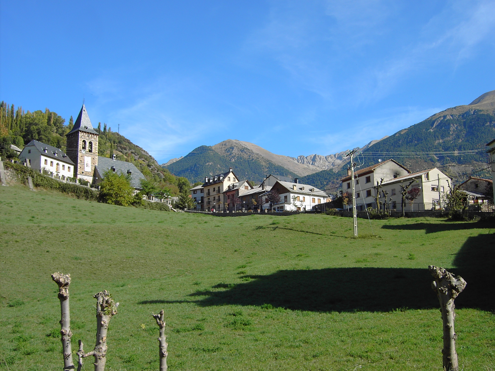 Plan, vista general del núcleo.